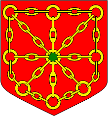 de gueules aux chaînes d’or, posées en croix, en sautoir et en orles, allumées en cœur de sinople, qui est de Navarre